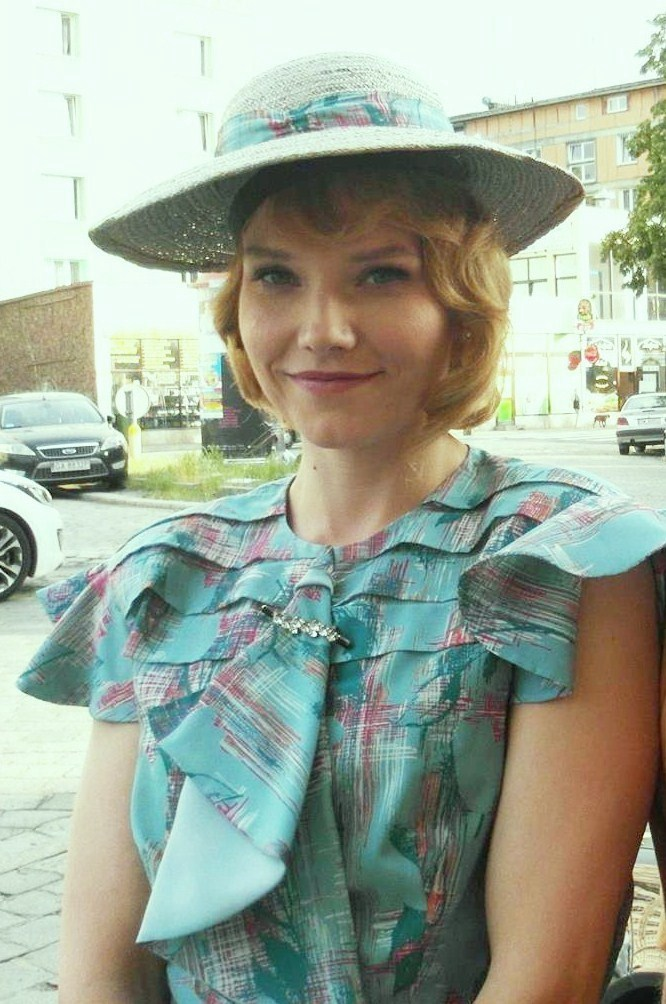 Aktorka Roma Gąsiorowska jako Zula Pogorzelska na planie serialu "Bodo".